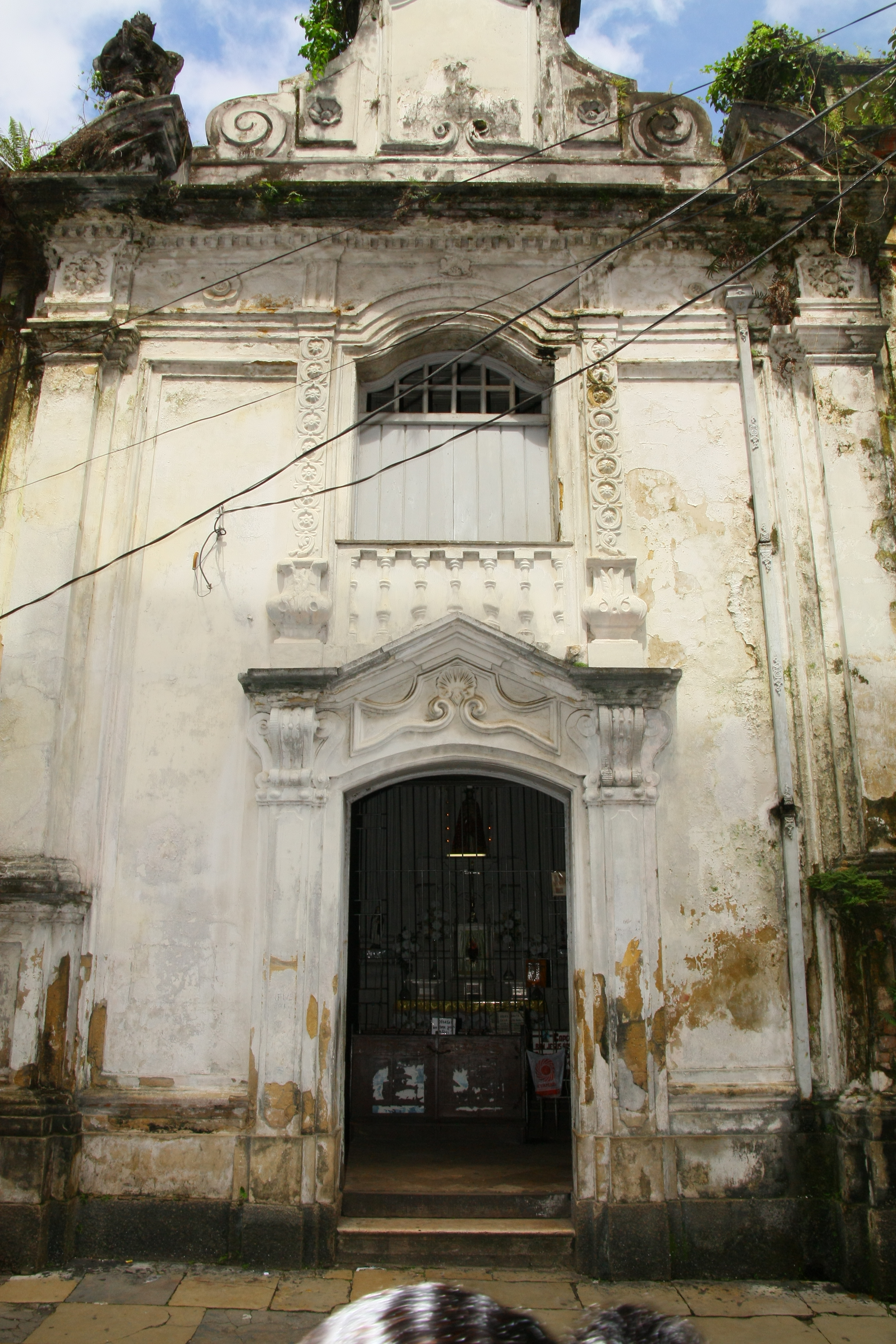 IMG_3679-Capela Pombo